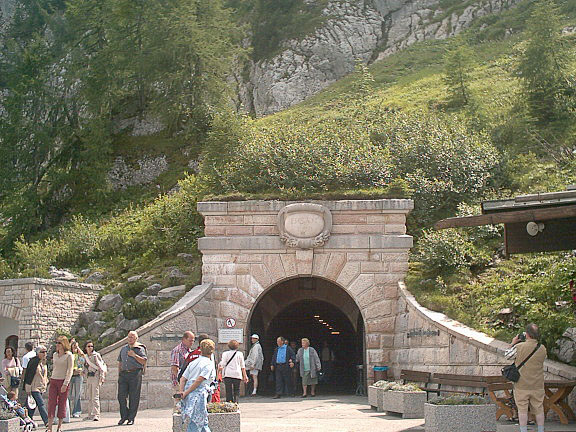 Die Eingangspforte mit Tunnel zum Aufzug ins Kehlsteinhaus eigenes Bild Fotograf: Nixalsverdruss 10.08.2004